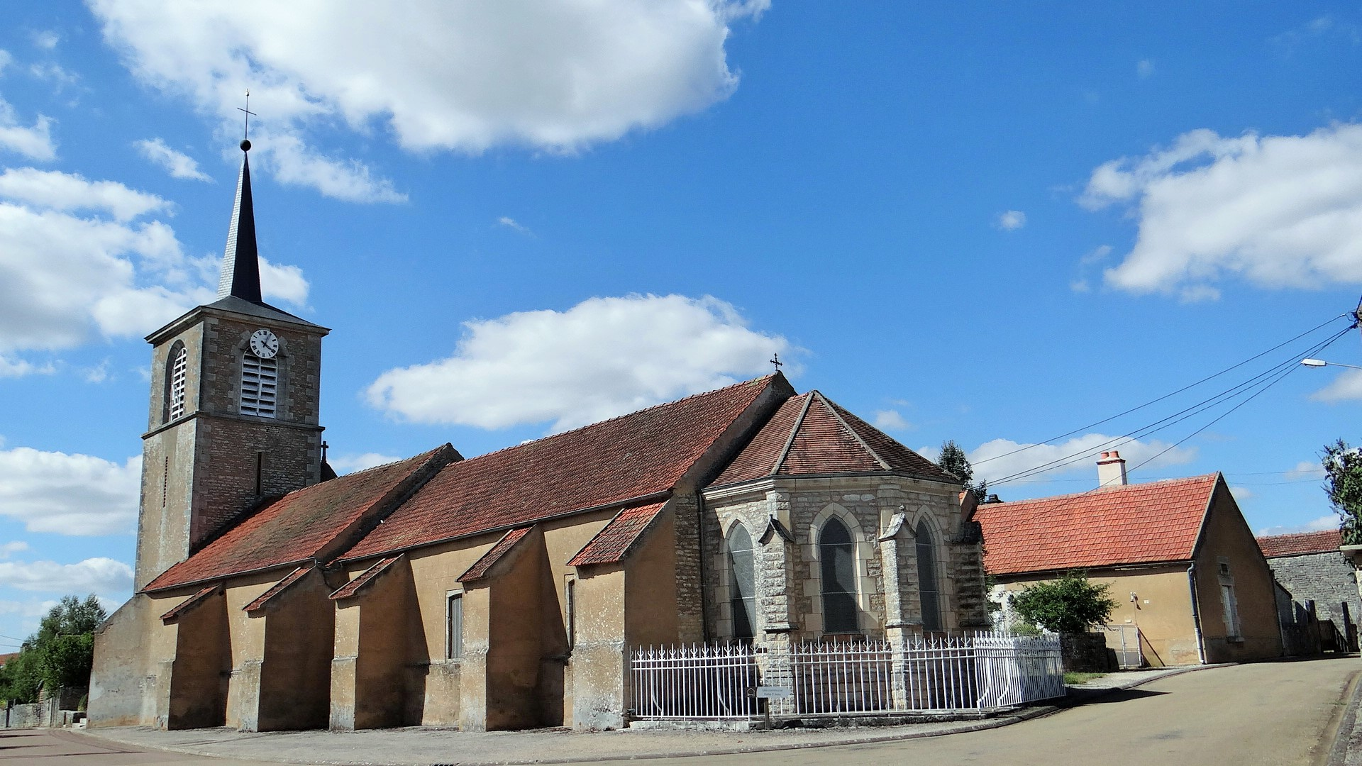 Église Saint Jean-Baptiste, Annoux